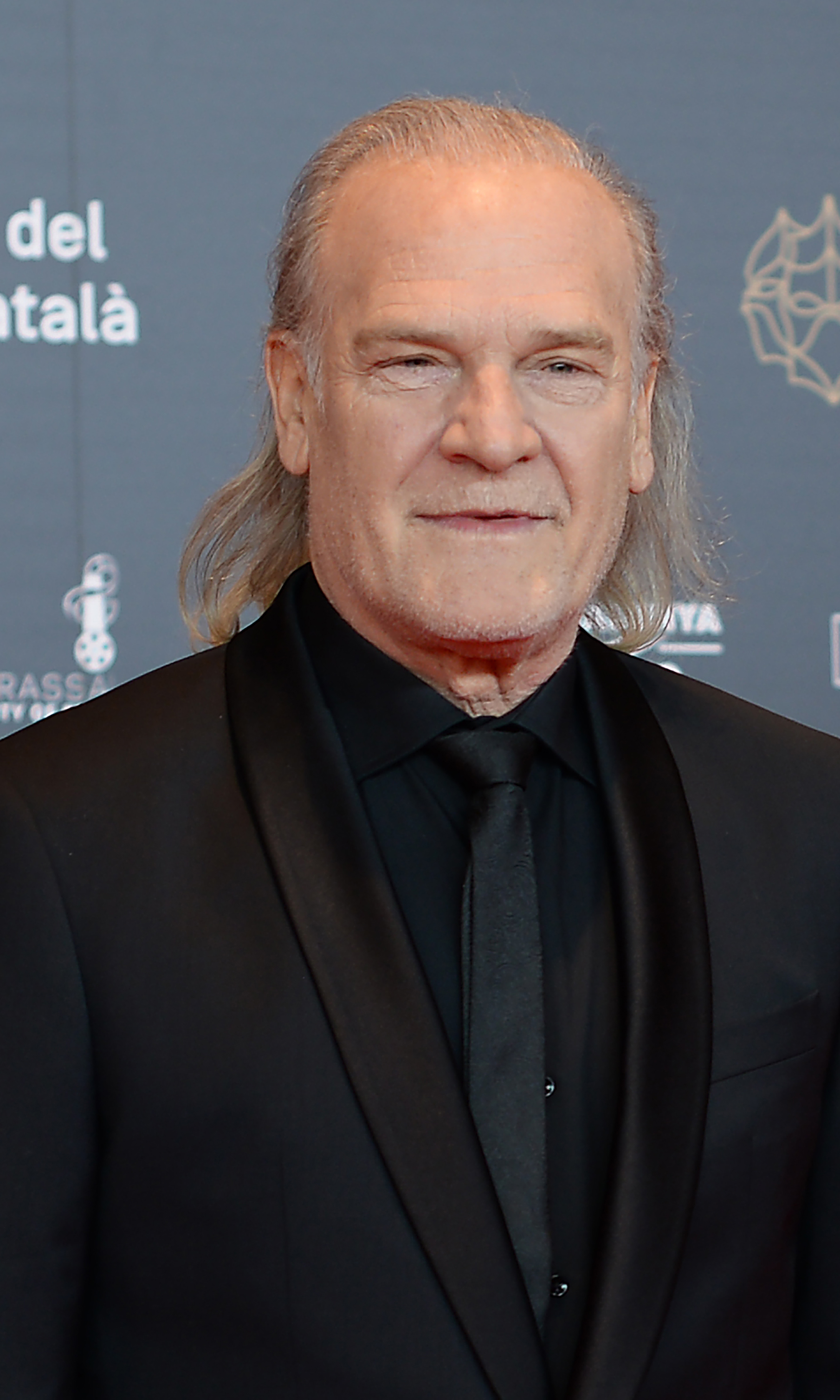 Lluís Homar, actor, XII Premis Gaudí (2020)